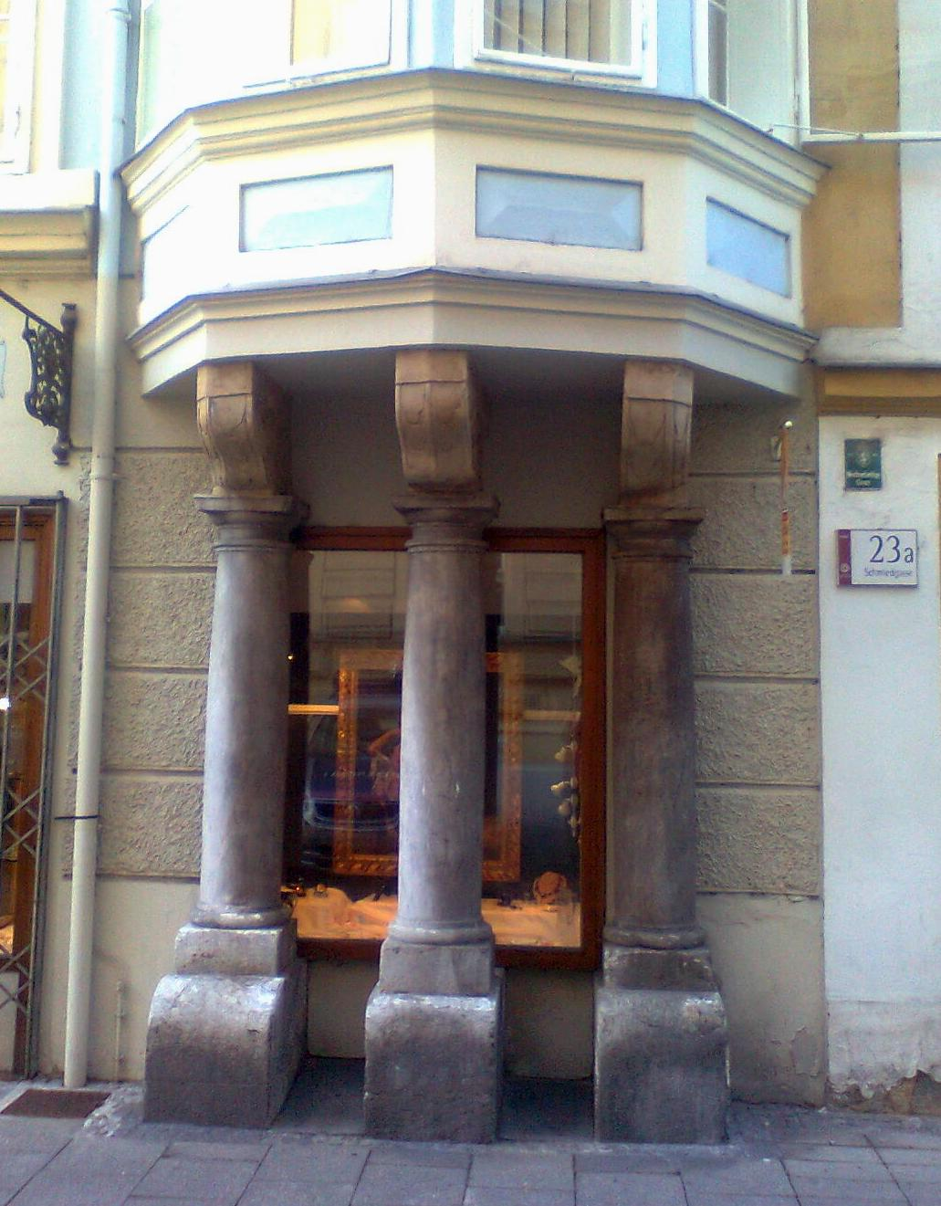 Palais Kollonitsch, Graz, Eckerker